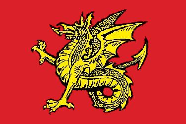 Bandeira do Ancião Reino de Wessex, localizado na Inglaterra, Reino Unido.